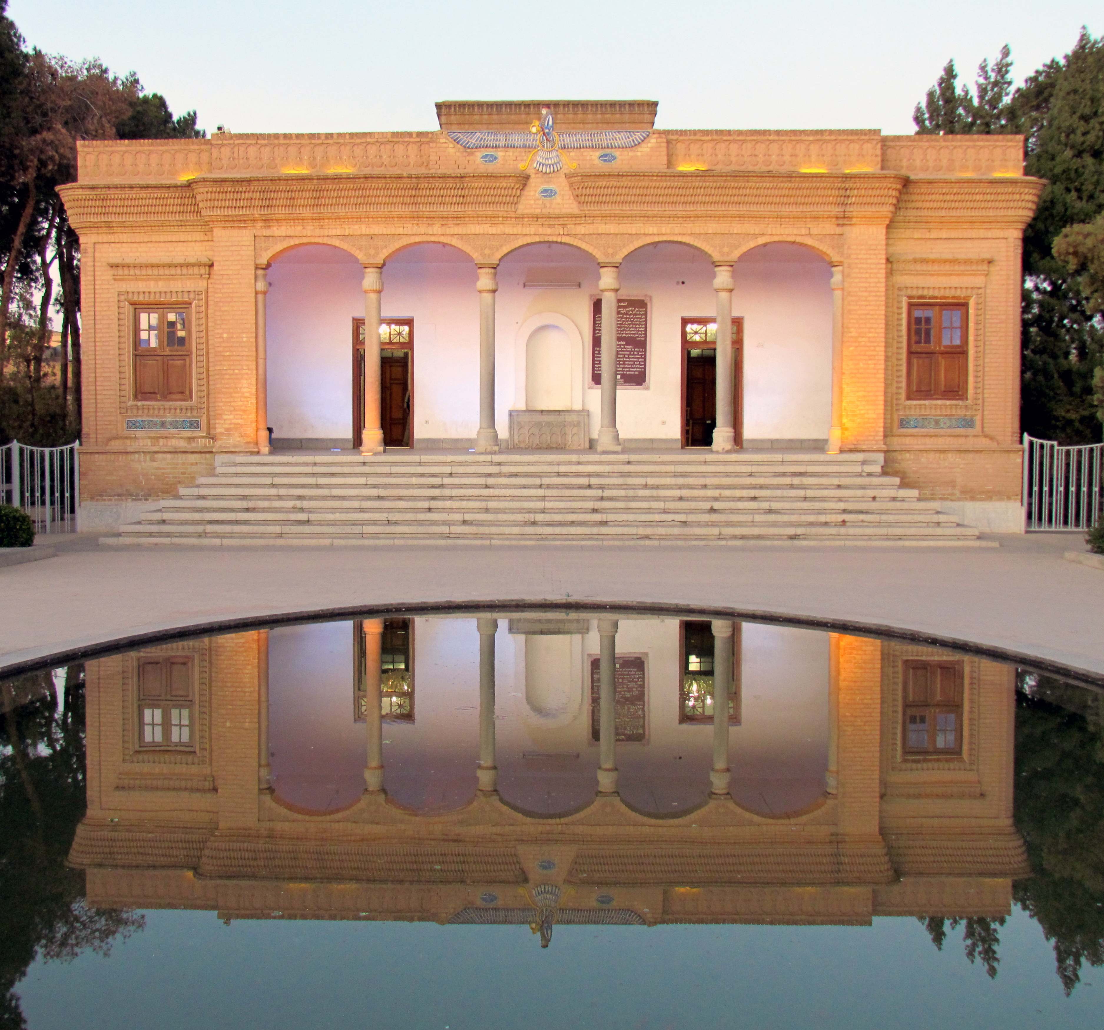 Atashkadeh, Yazd, Iran